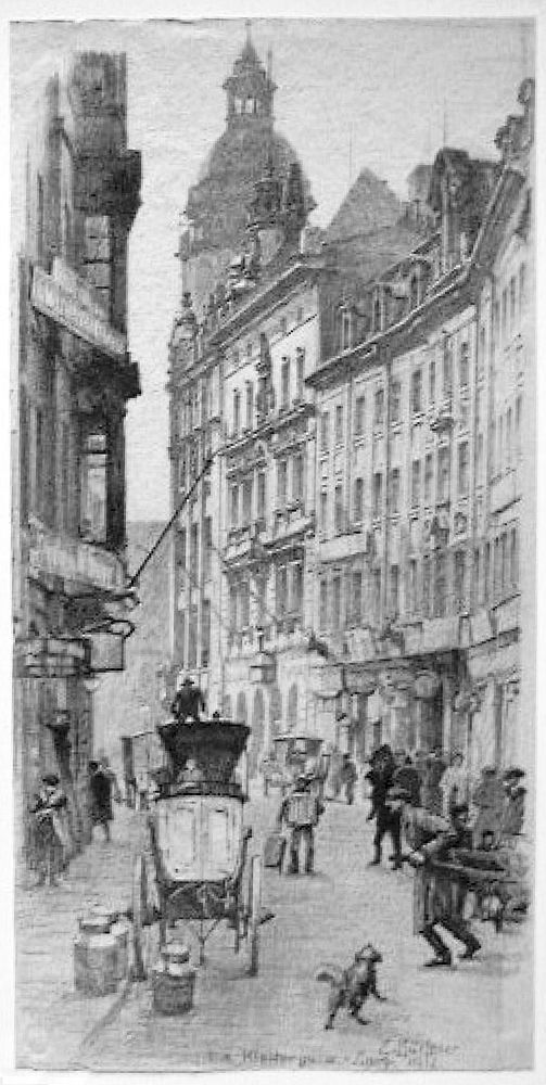 Die Leipziger Klostergasse nach Süden. Rechts das Alte Kloster (um 1912). Zeichnung von Emil Büchner